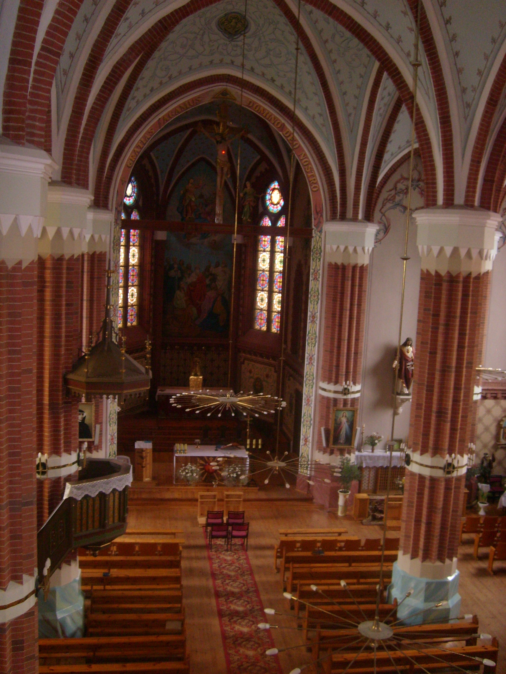 Беларуская (тарашкевіца): Касьцёл Сьв. Антонія Падуанскага. г. Паставы